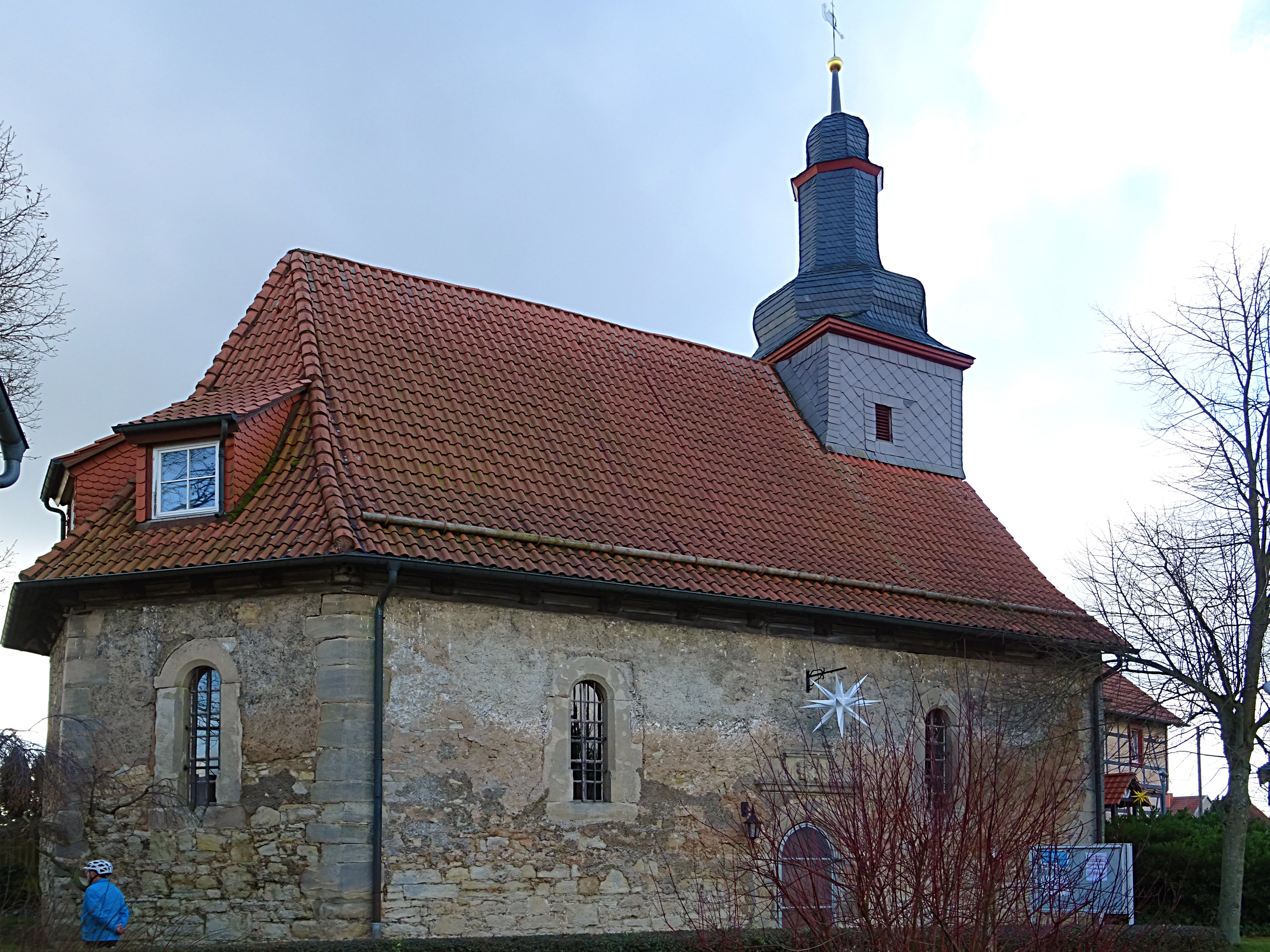 St.-Johannes-Kirche zu Kaltohmfeld